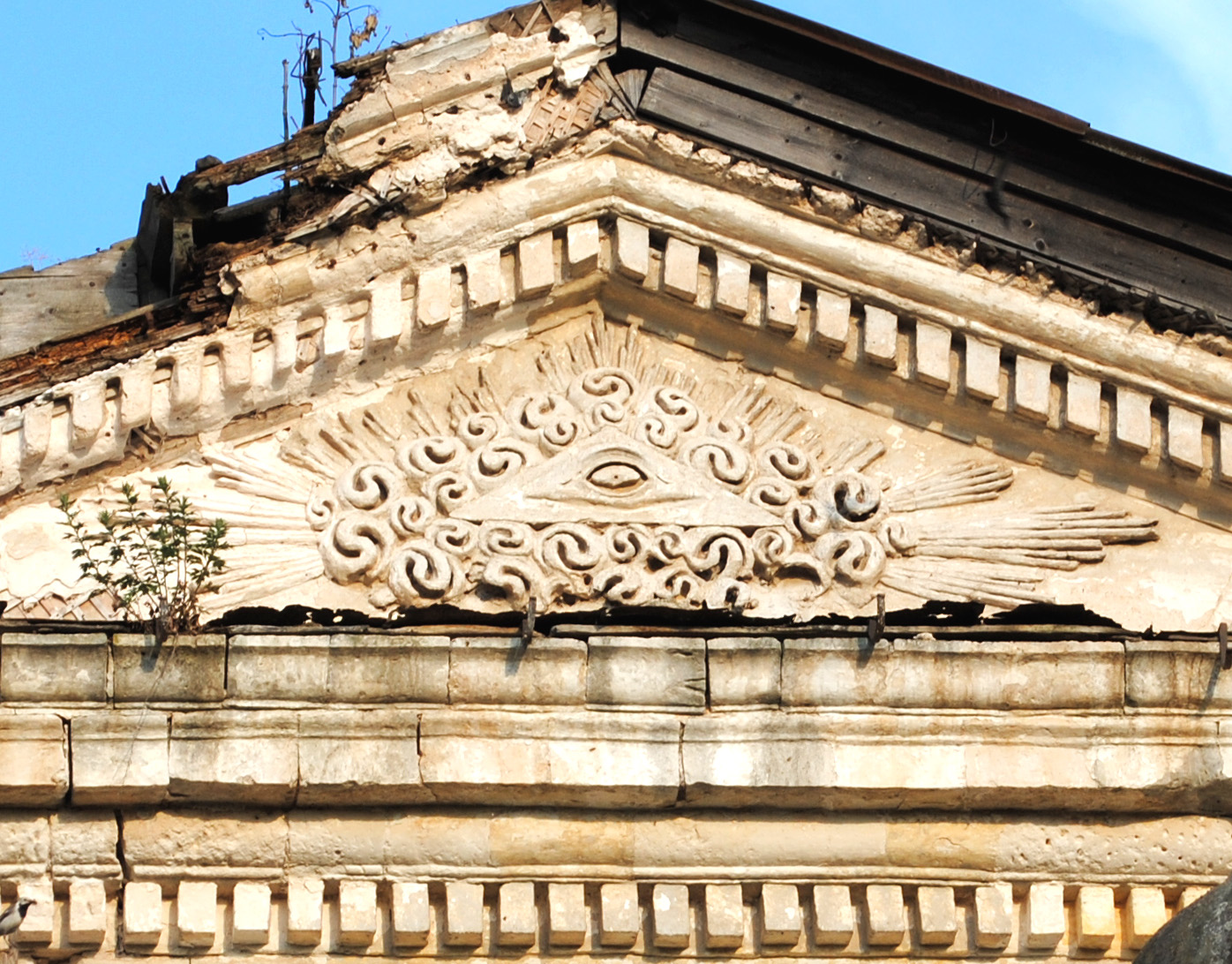 Храм Казанской иконы Божией Матери в селе Ярополец Всевидящее Око.